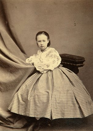 Sof'ja L'vovna Perovskaja (1853-1881)